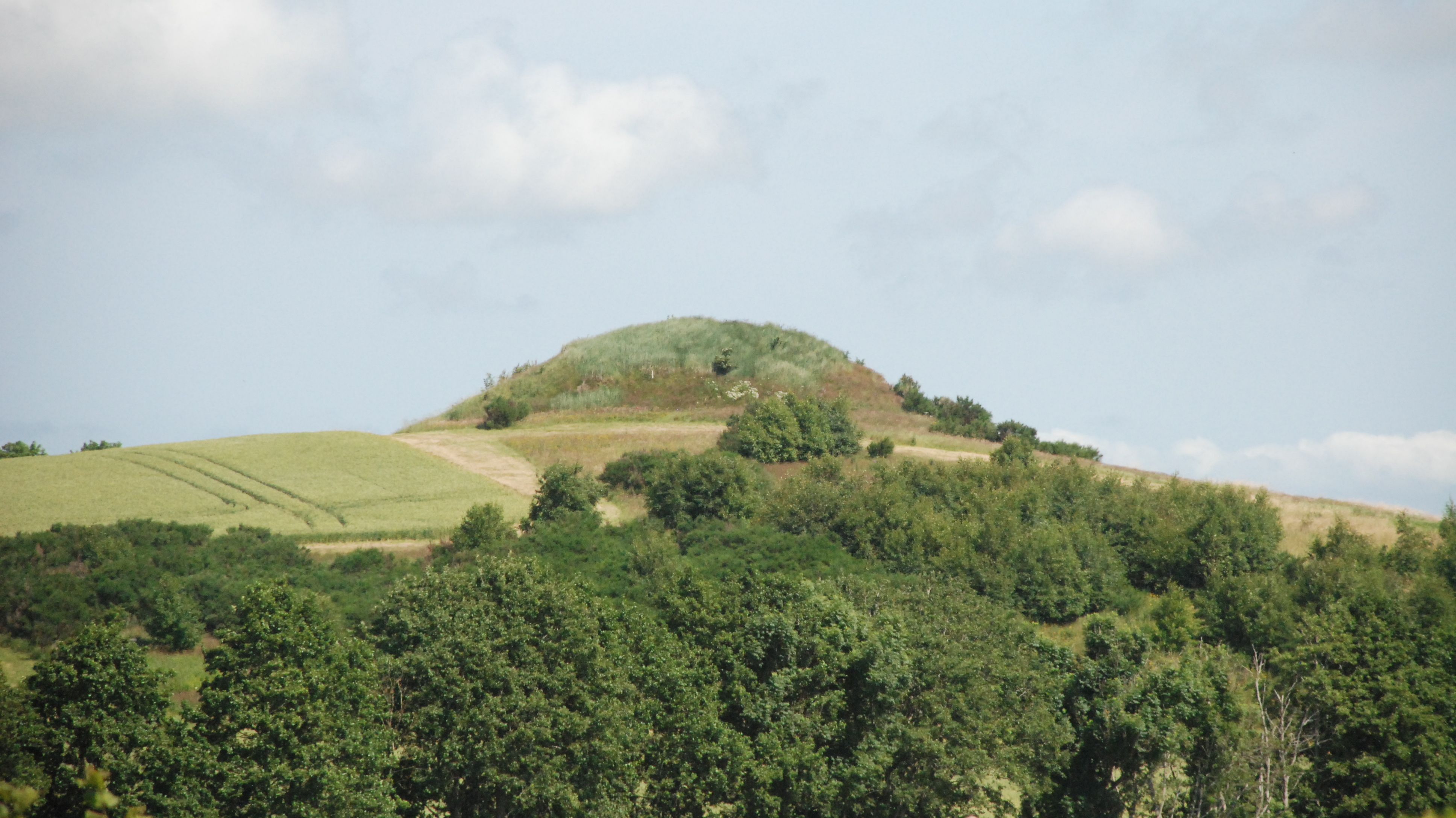 Gravhøjen Ludshøj, Blistrup Sogn, Holbo Herred, Frederiksborg Amt, Danmark, fotograferet fra omkring vestsydvest.